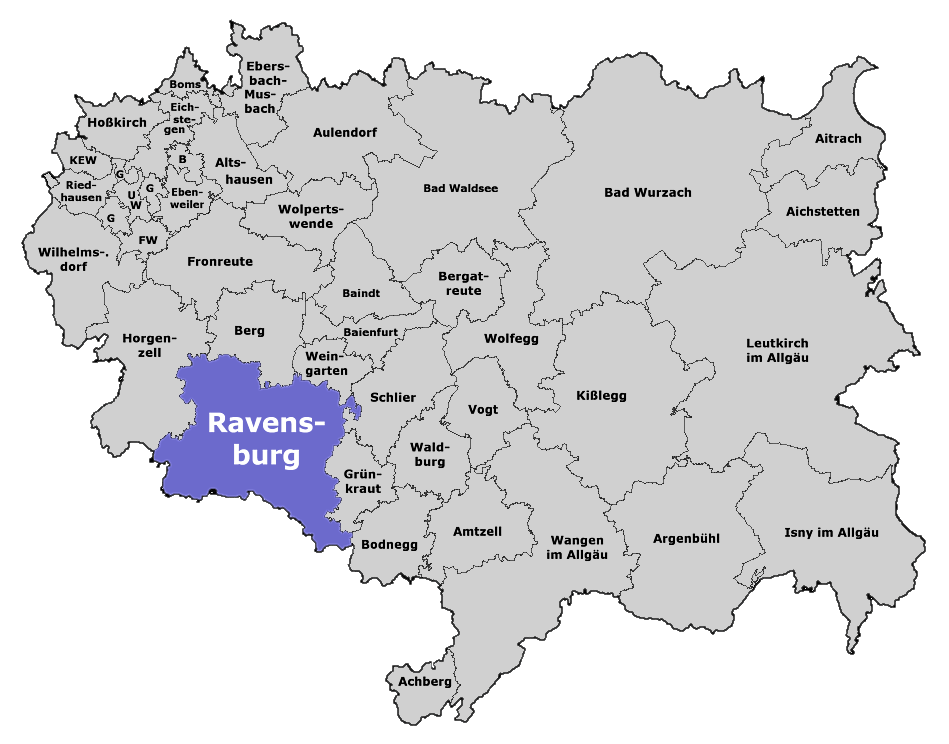 Position von Ravensburg im Landkreis Ravensburg